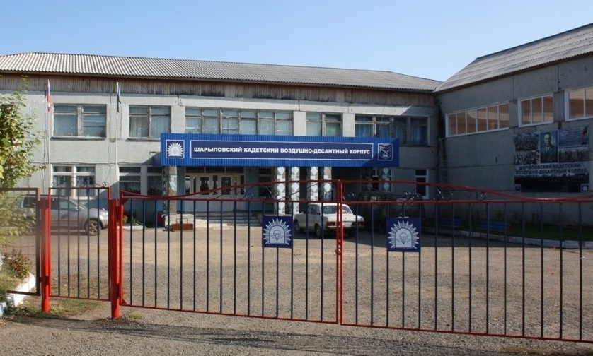 Шарыповский кадетский корпуc. Красноярский край, г. Шарыпово, п. Дубинино, ул. Дружбы, 15